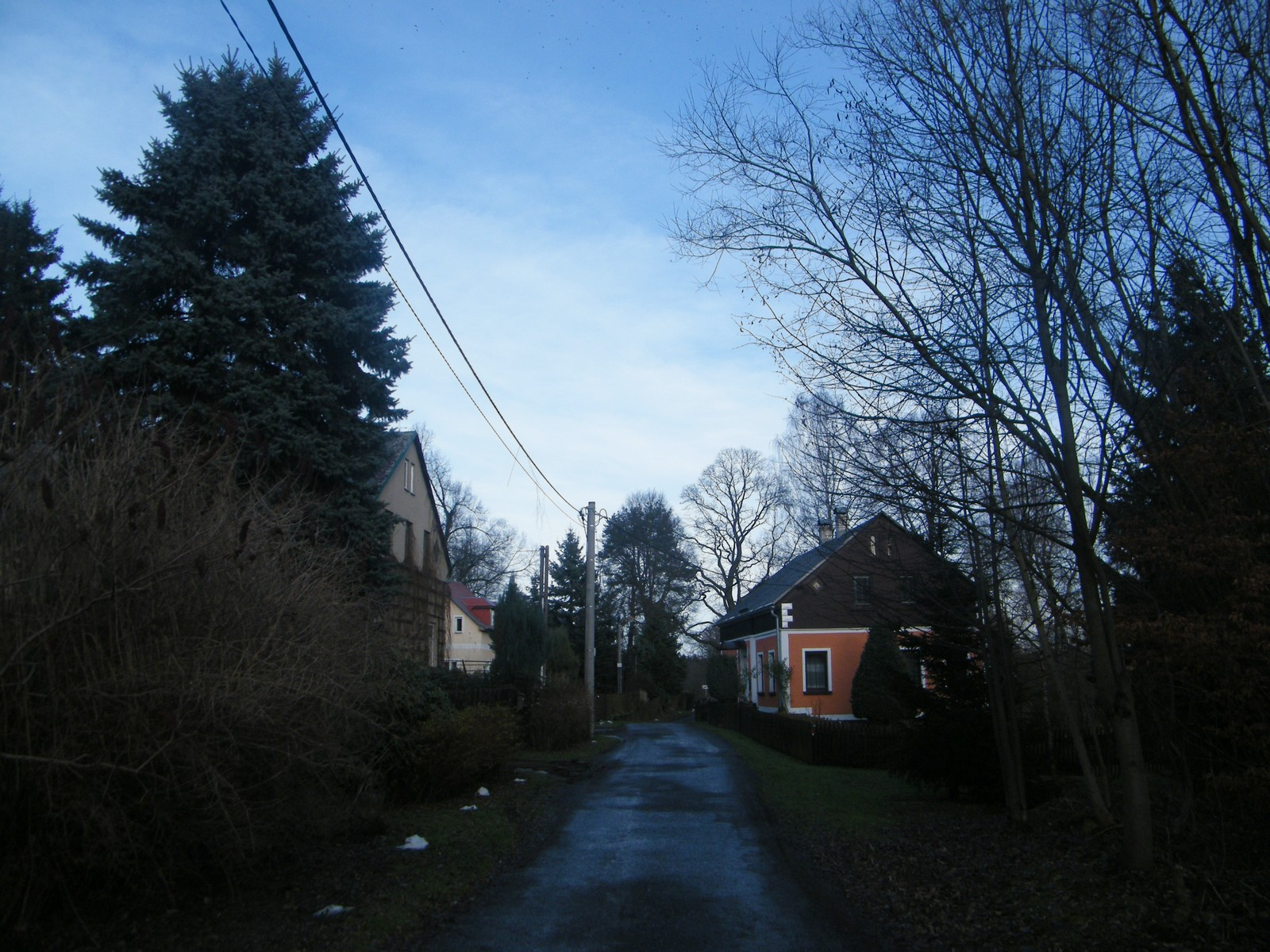 Hlavní ulice v Nové Vísce u Dolní Poustevny